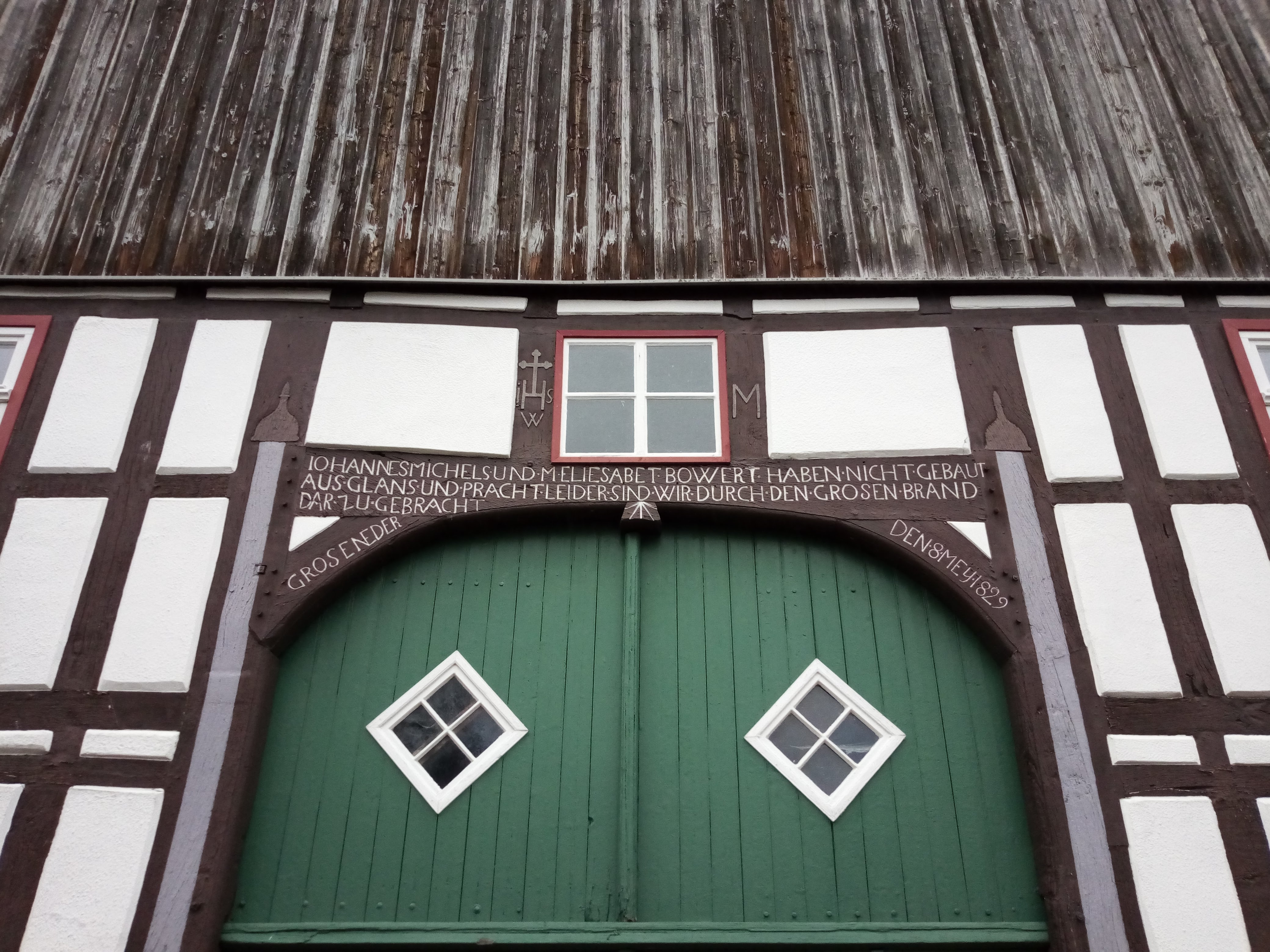 Michelshof (1829), Auf'm Thie, Großeneder, Borgentreich